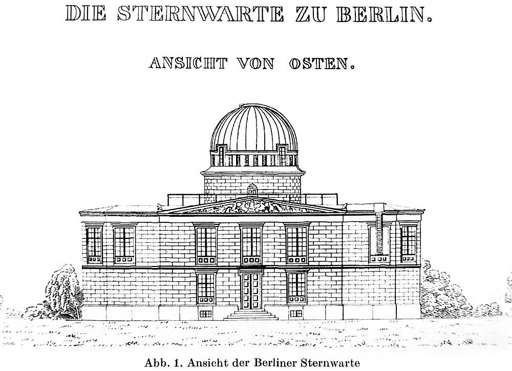 Neue Berliner Sternwarte, Lindenstr., Kreuzberg nach Johann Franz Encke: Astronomische Beobachtungen auf der Königlichen Sternwarte zu Berlin, 1. Bd. Berlin 1840.